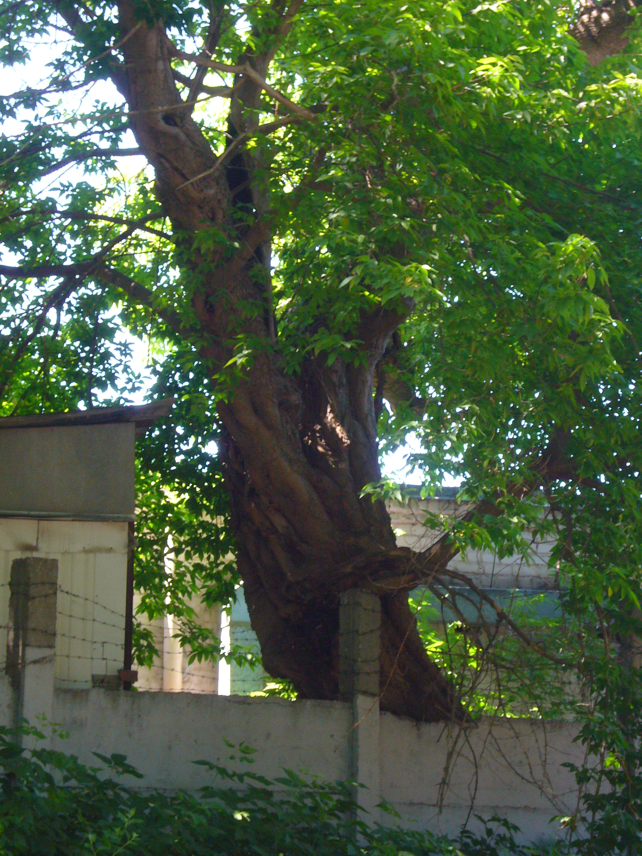 Экземпляр клёна ясенелистного возрастом около 30 лет, поражённого гнилью. Саратов.